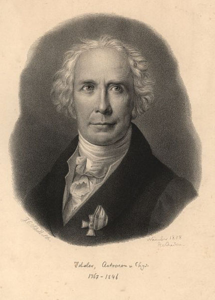 Христиан Людвиг Иделер